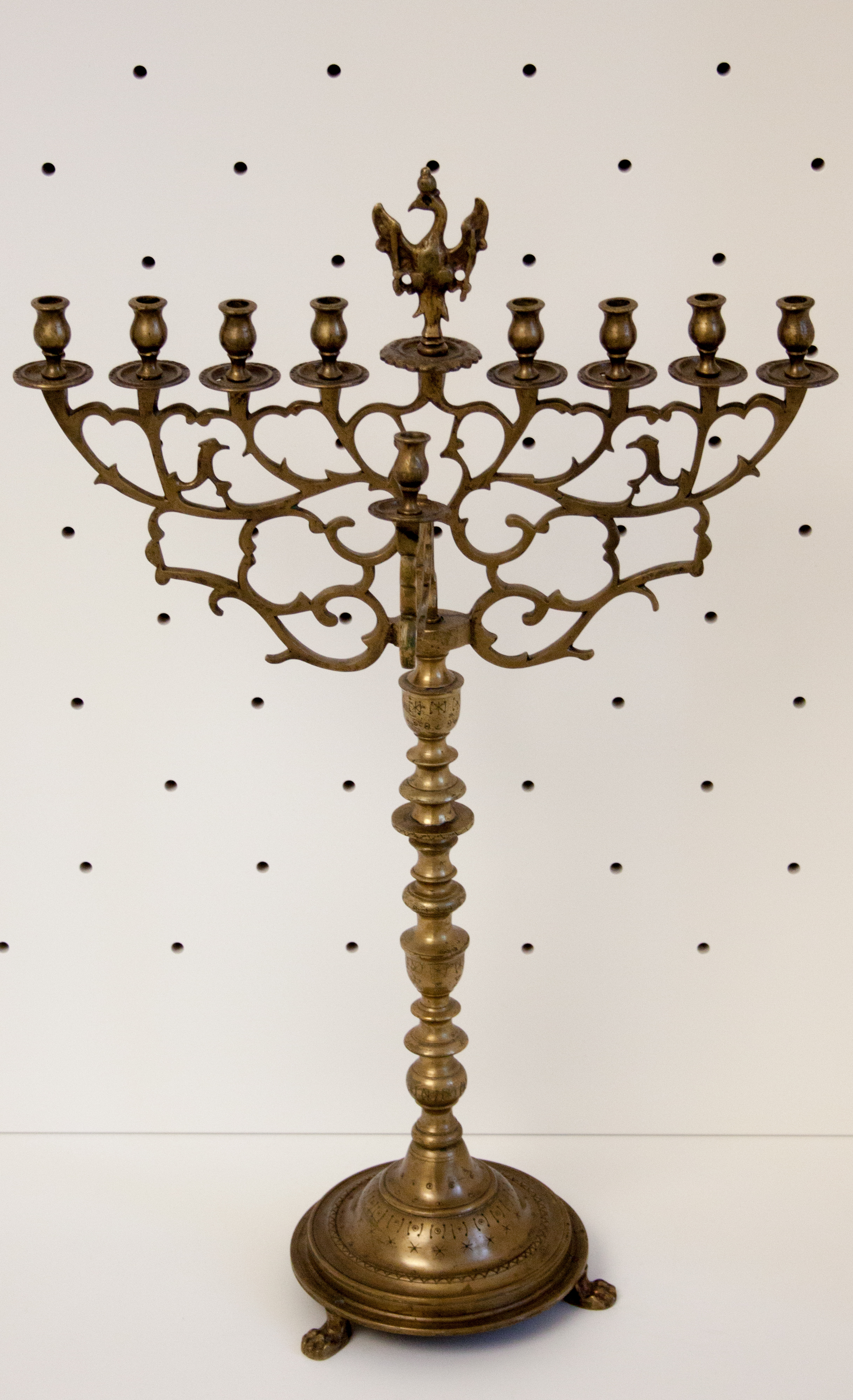 Hanukkah Menorah